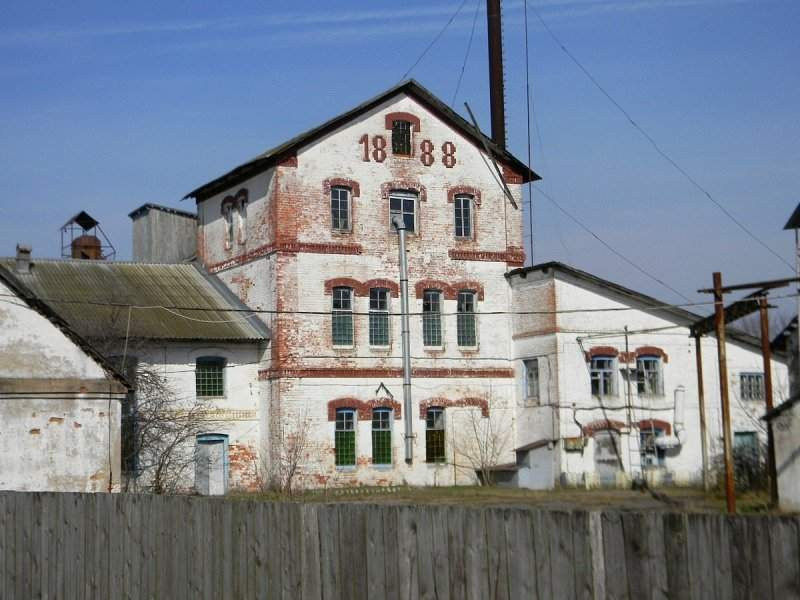 Завалочыцы. Сядзіба Жылінскіх. Бровар